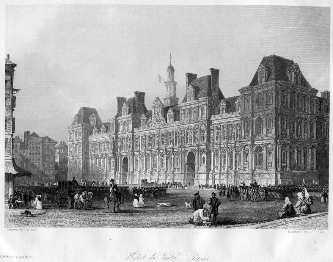 Rathaus Paris, Frankreich